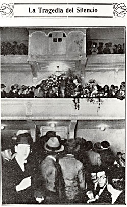 Spectateurs au théâtre Faenza de Bogota pour la sortie de "La strategia del silencio" le 18 juillet 1924.